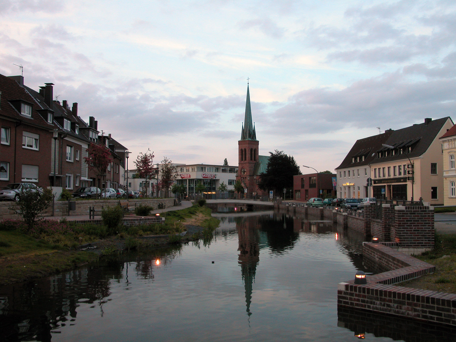 Wall- und Grabanlagen in Dorsten. Blick von Süden Richtung Platz der Deutschen Einheit mit der ev. Johanneskirche.